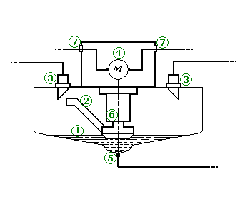 Wie funktioniert ein Turbowechselrichter? anhand des Schaltzeichens. 1 = Quecksilber 2 = Quecksilberstrahl 3 = feste Elektroden, an denen der Strahl vorbeistreicht 4 = Antriebsmotor 5 = Elektrode, die mit dem Quecksilber elektrisch verbunden ist 6 = Schleuder 7 = gasdichte Elektrodendurchführungen. Da ein solches Schaltzeichen von jedermann erstellbar ist, hat es meiner Meinung nach keine hohe Schöpfungshöhe und ist deshalb gemeinfrei. Es müsste eigentlich so stimmen, wie ich es hier gezeichnet habe. Wer meint, dass es so aber nicht stimmt, lege bitte selbst Hand an oder informiere mich drüber. Danke!